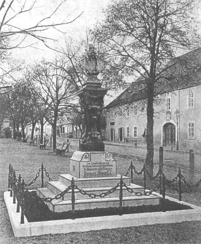 Wien-Mauer, Kaiser-Franz-Josef-Denkmal am Maurer Hauptplatz, um 1900, Archiv Karl Buberl